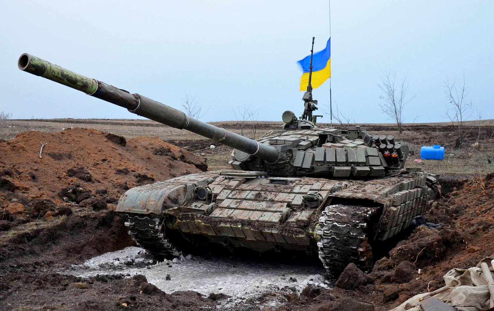 Захваченный ВСУ танк Т-72.